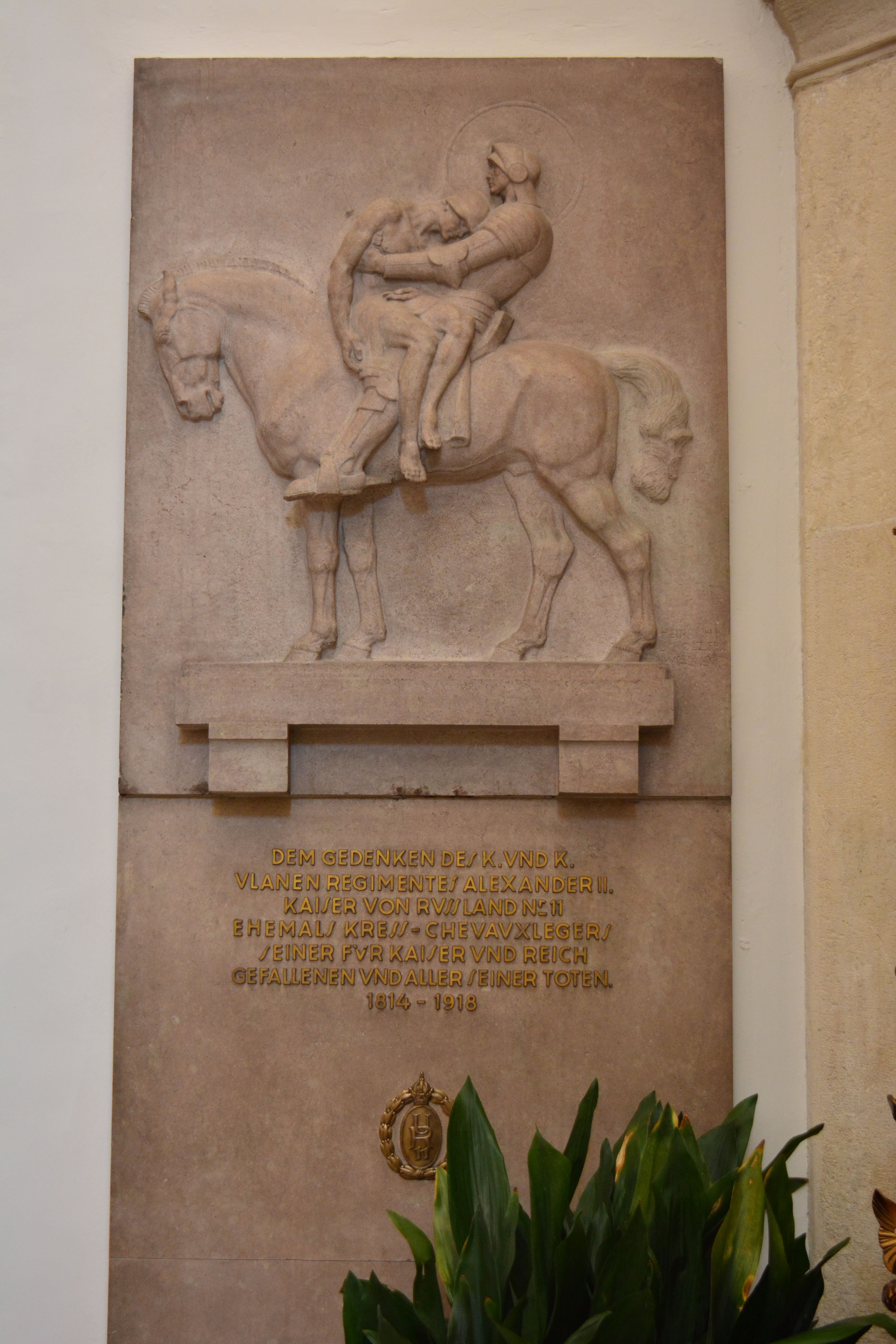 Gedenktafel für das k.u.k. Ulanenregiment Nr. 11 (Wien, Neuer Markt, Kapuzinerkirche)